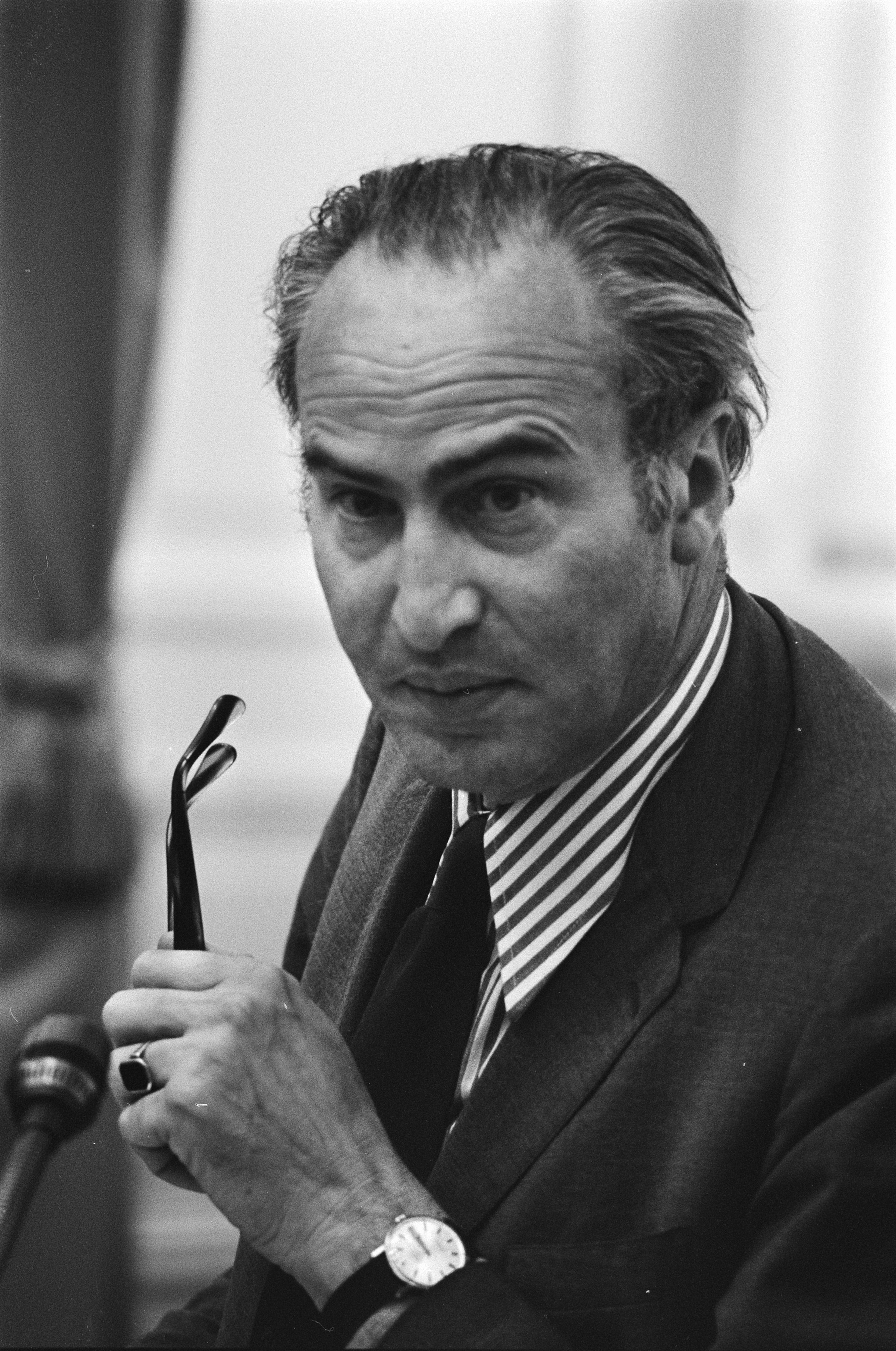 Collectie / Archief : Fotocollectie Anefo Reportage / Serie : [ onbekend ] Beschrijving : Tweede Kamer debat; Vredeling Datum : 18 juni 1974 Locatie : Den Haag, Zuid-Holland Trefwoorden : ministers, parlementaire debatten, politiek Persoonsnaam : Vredeling, Henk Fotograaf : Verhoeff, Bert / Anefo Auteursrechthebbende : Nationaal Archief Materiaalsoort : Negatief (zwart/wit) Nummer archiefinventaris : bekijk toegang 2.24.01.05 Bestanddeelnummer : 927-2636